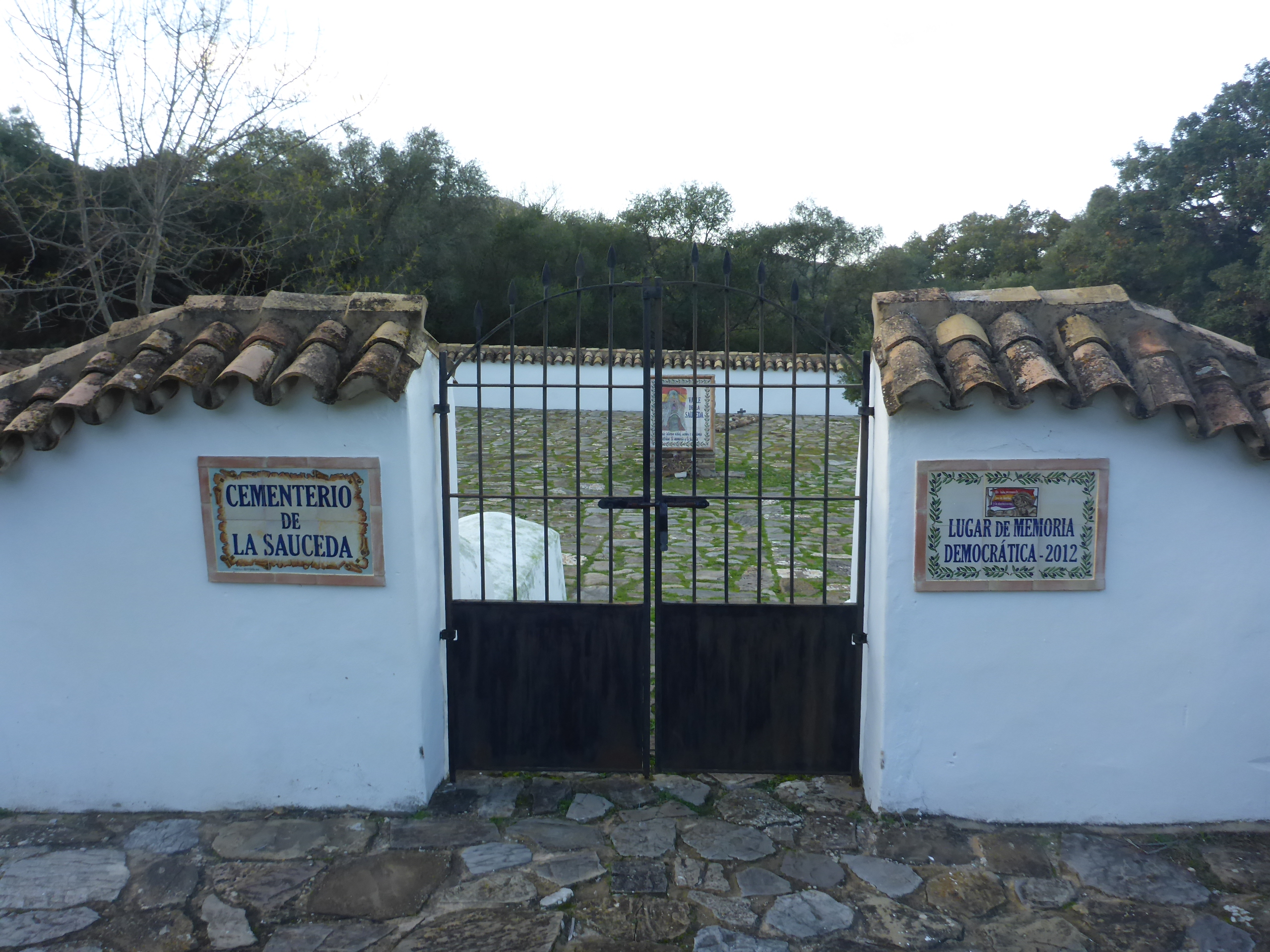 Entrada al cementerio La Sauceda (Cortes de la Frontera, España)